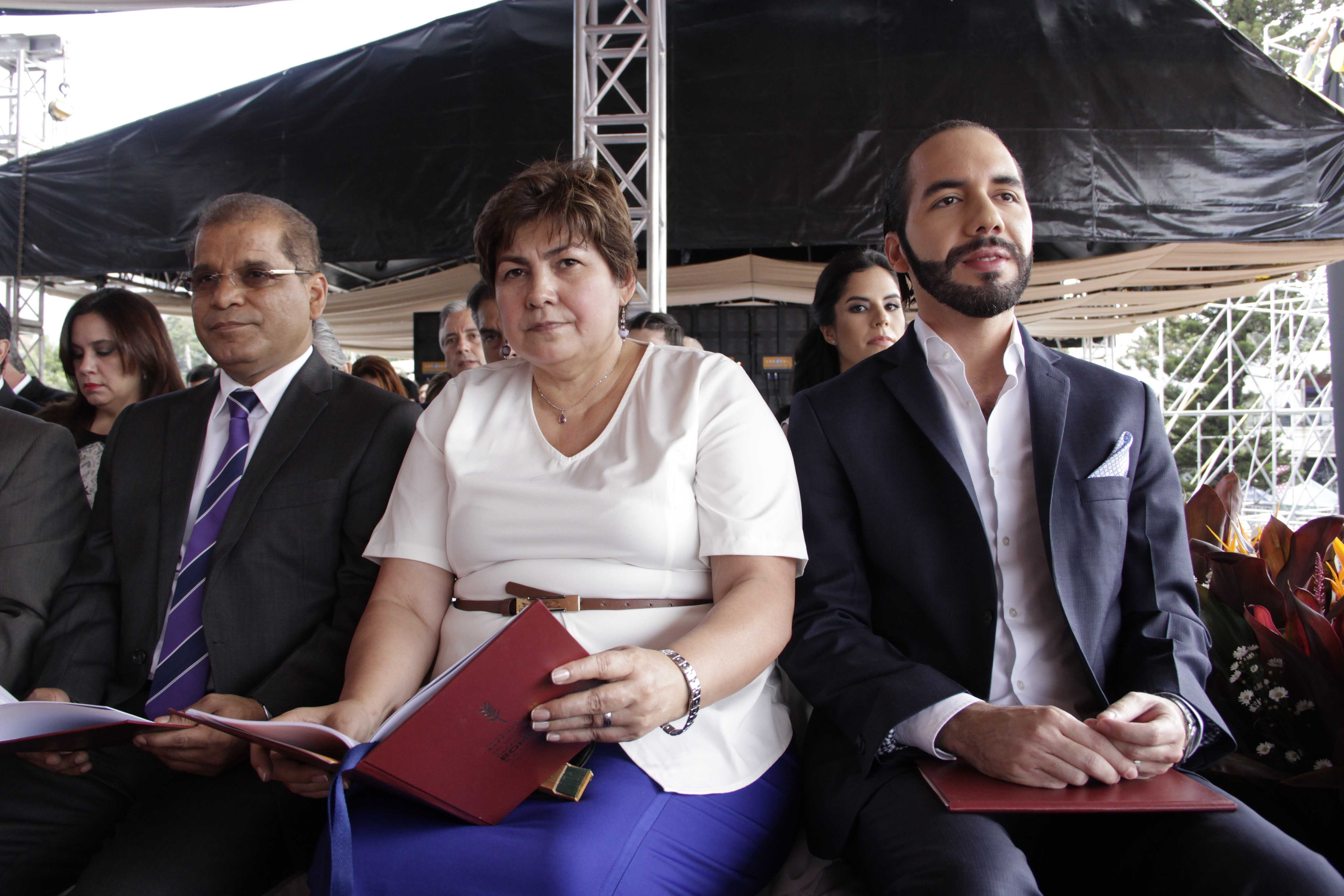 Vice Presidente Oscar Ortiz y su esposa , los acompaña Nayib Bukele